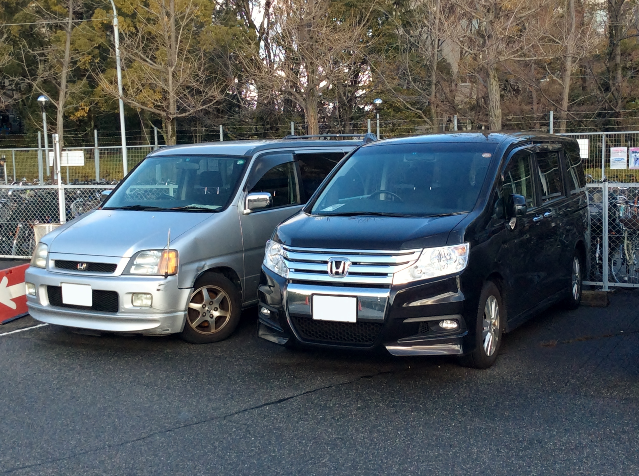 ホンダ・ステップワゴンの初代及び4代目スパーダをそれぞれフロントから撮影。